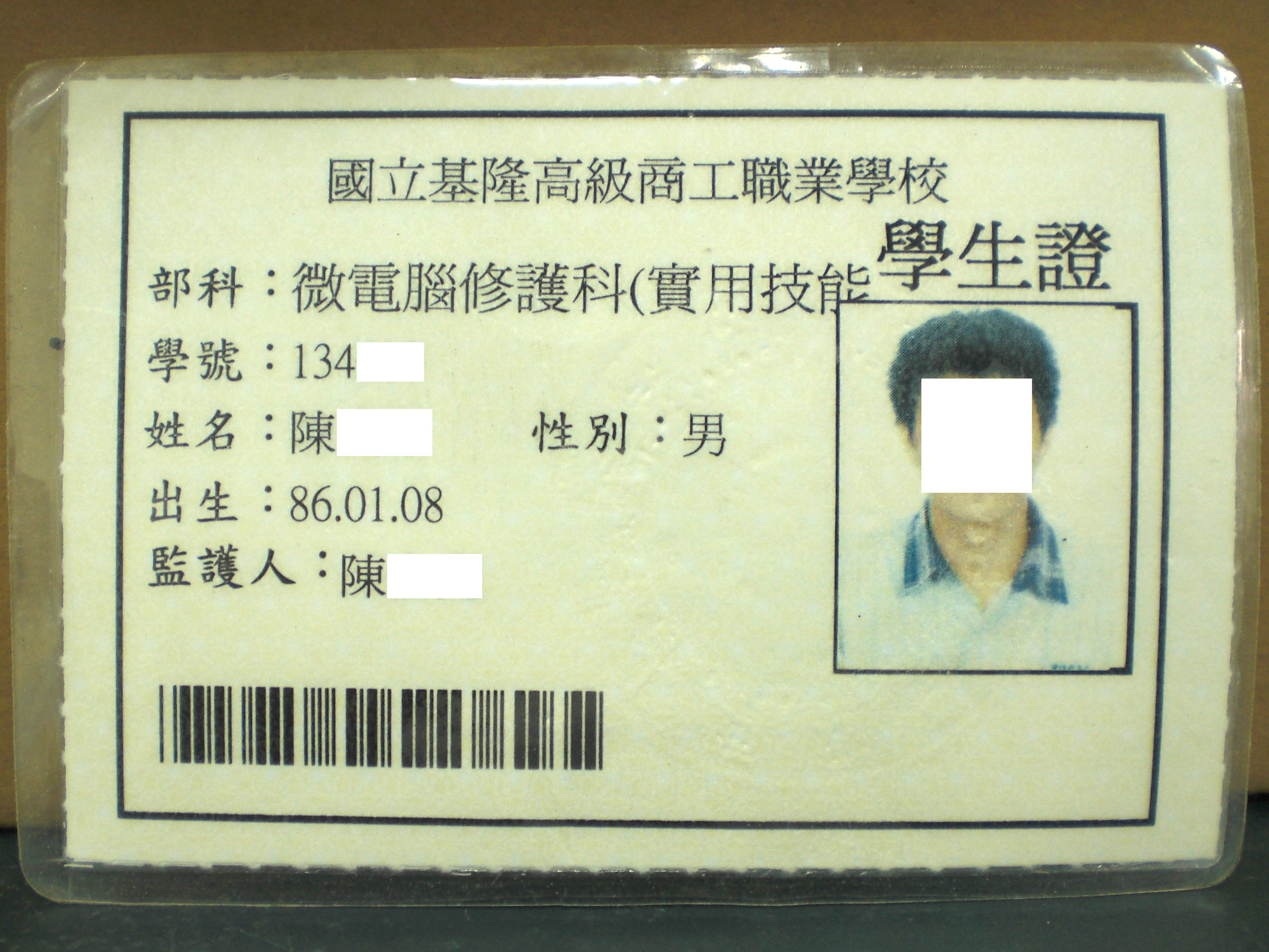 國立基隆高級商工職業學校學生證2012年9月版正面